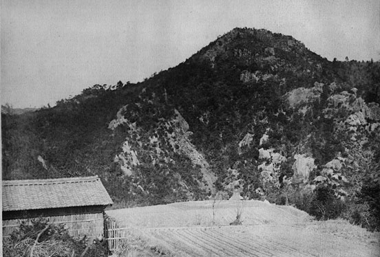 坂下から眺めた筆捨山